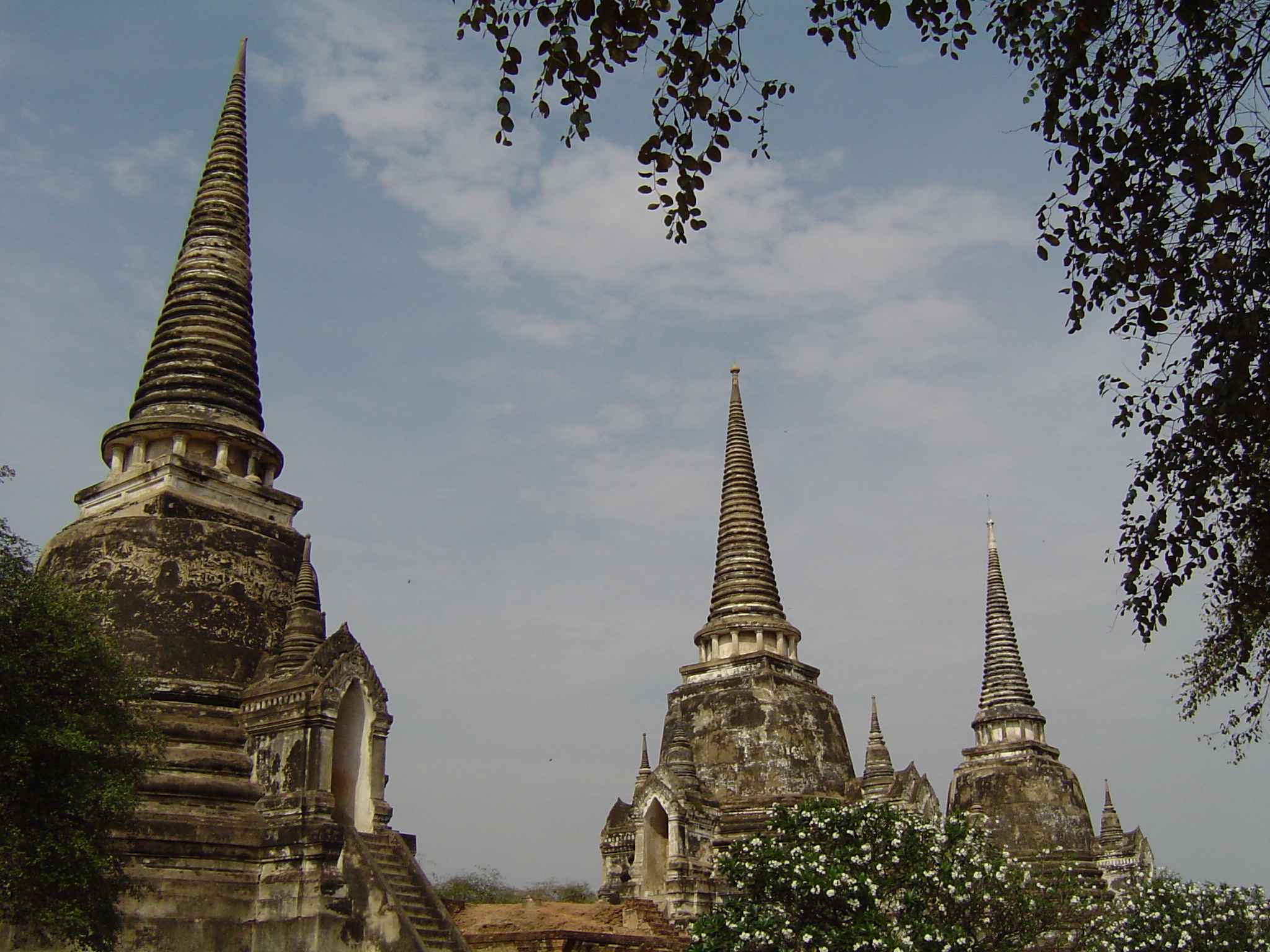 ภาพพระปรางค์ประธาน 3 องค์ วัดพระศรีสรรเพชญ์